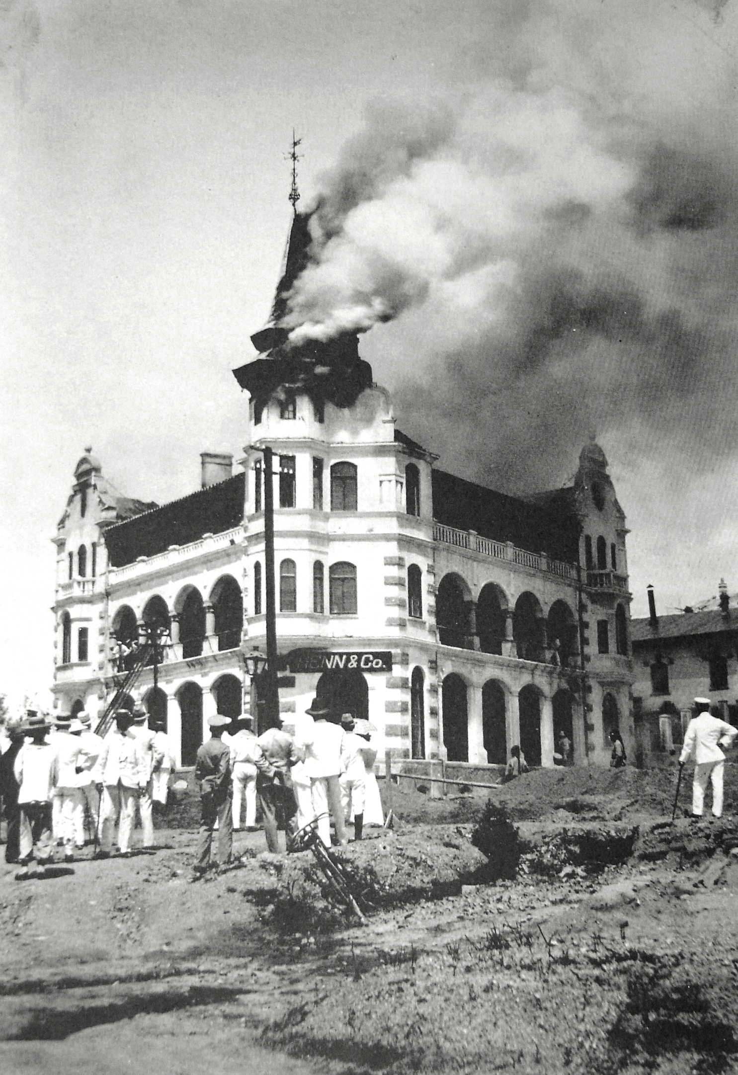 青岛海恩大楼火灾